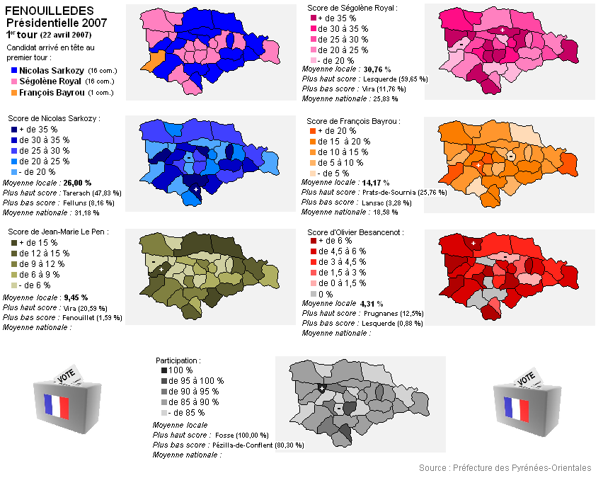 Carte des résultats des 5 principaux candidats à l'élection présidentielle française (1er tour) dans les Fenouillèdes (Pyrénées-Orientales)